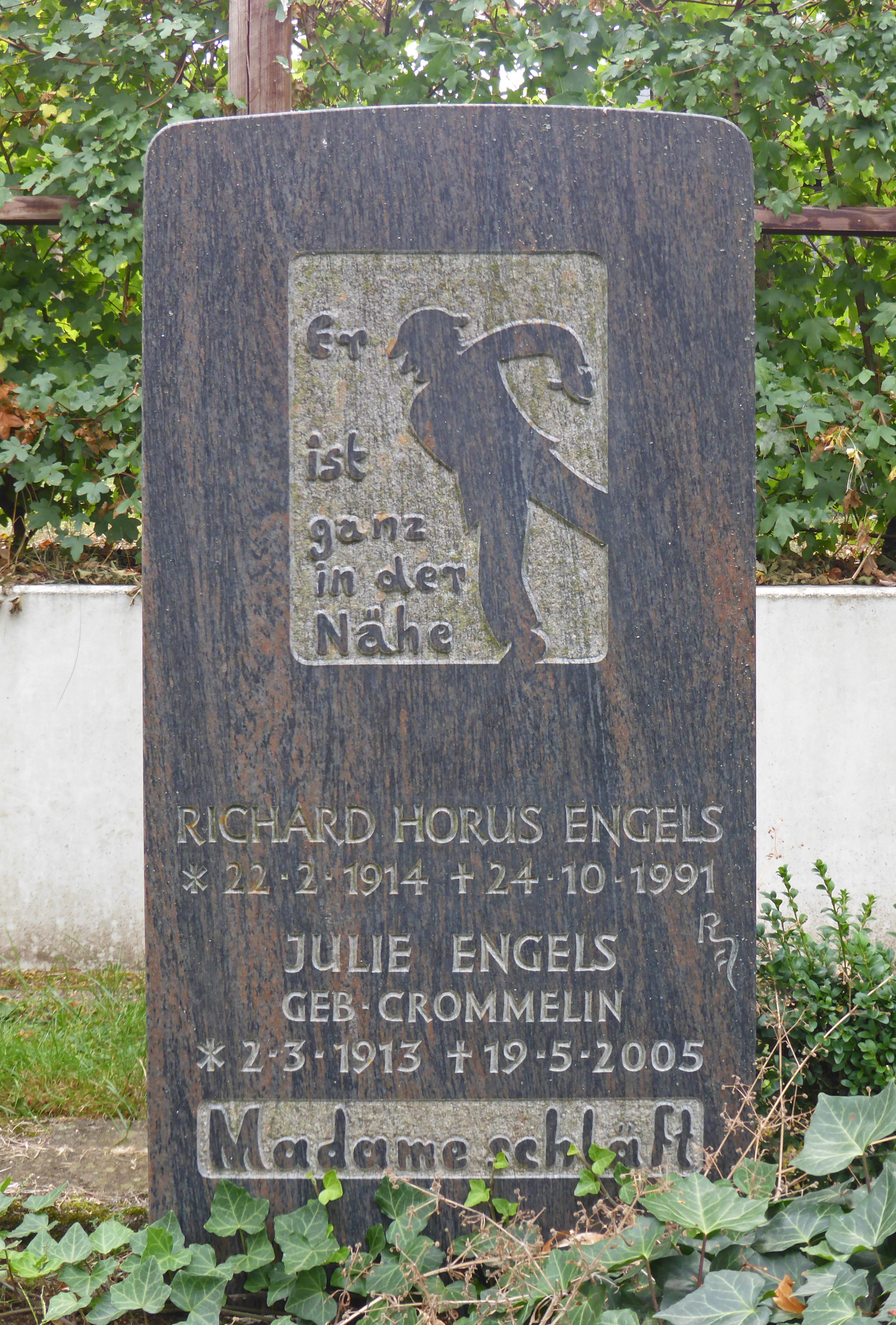 Grabstein auf dem Friedhof in Neuhaus, Ortsteil von Wolfsburg.